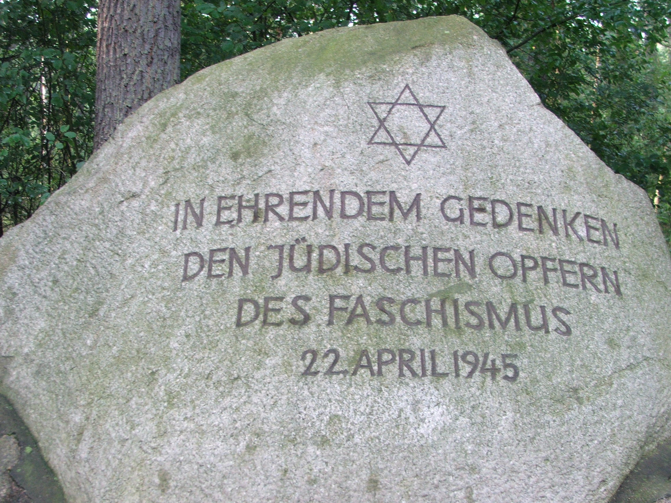 Teil des Grabmals am Kilometer 101,6 bei Langennaundorf